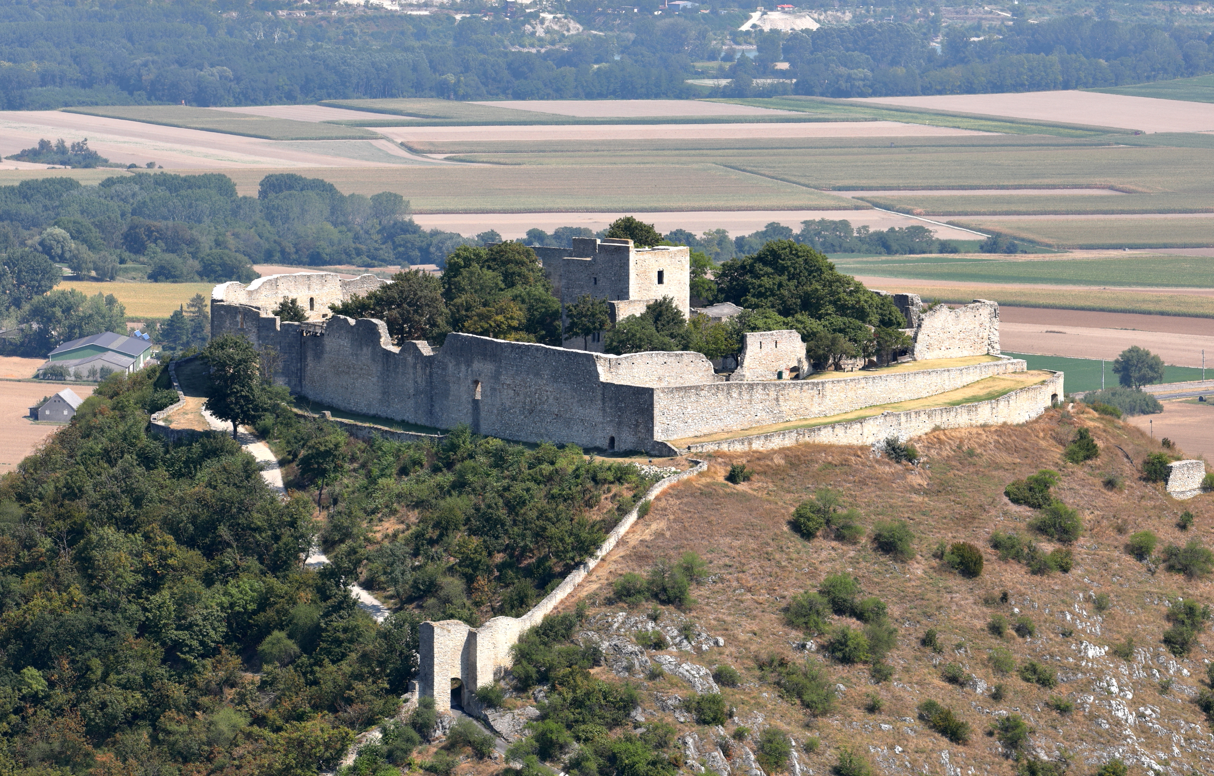 Die Burgruine Heimenburg, auch als „Burgruine Hainburg“ bezeichnet, auf dem 291 m hohen Schlossberg in der niederösterreichische Stadtgemeinde Hainburg an der Donau.Die ehemalige Burg auf dem weithin sichtbaren Schlossberg wurde ab Mitte des 11. Jahrhunderts errichtet. Sie wurde bei der 2. Türkenbelagerung 1683 zerstört. Nach 1742 trat, bedingt durch die Errichtung eines neuen Schlosses am Fuß des Schlossberges (1966 großteils abgetragen), der Verfall der Burg ein.